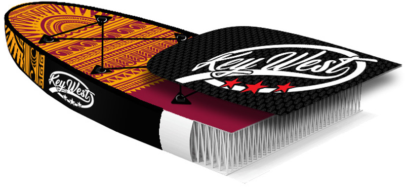 Vue des fils de nylon de la construction dropstitch